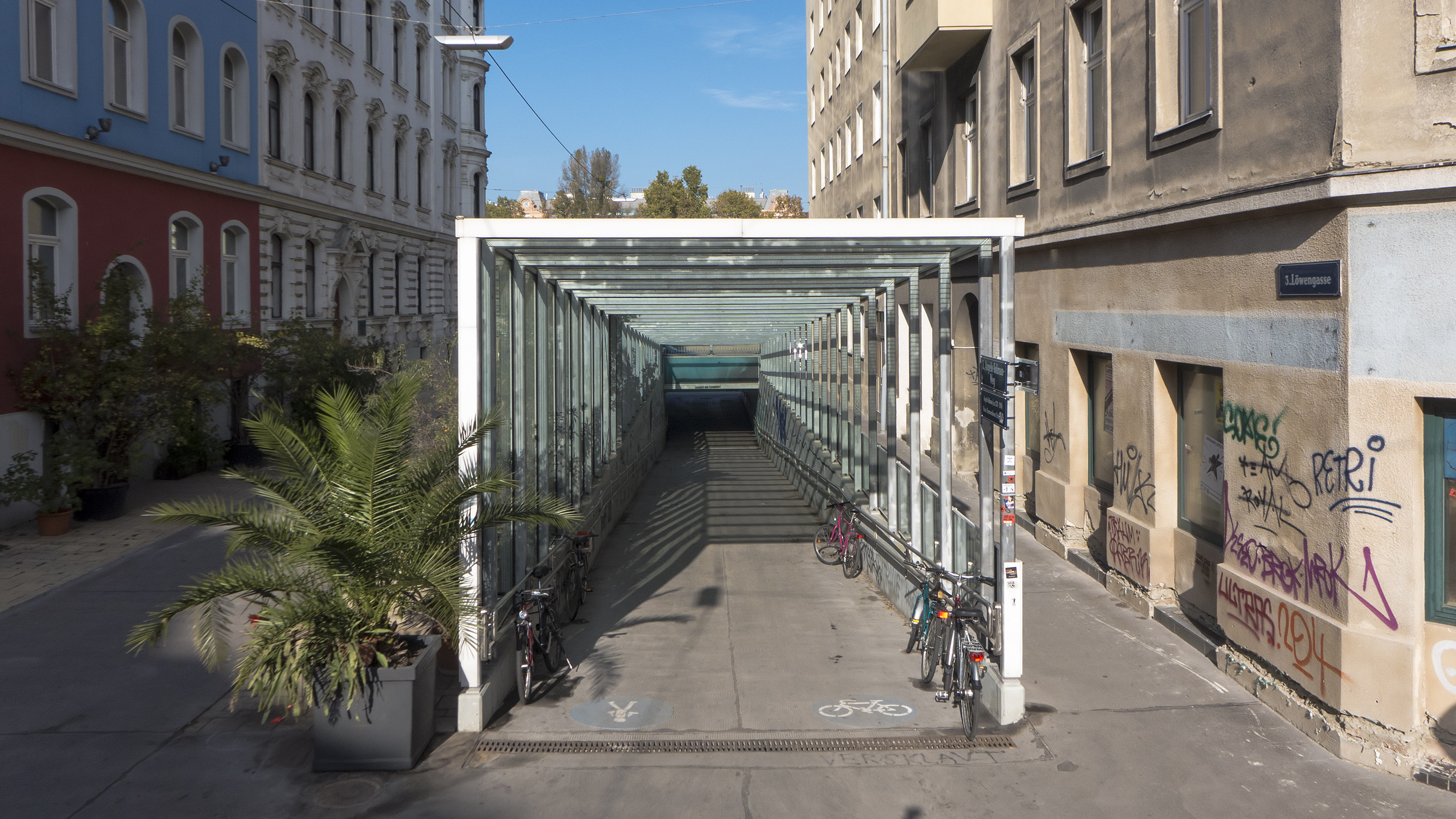 Angelo-Soliman-Weg in Wien 3 Richtung Norden